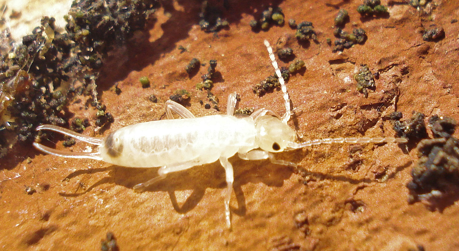 Ninfa de Dermaptera de primeiros ínstares